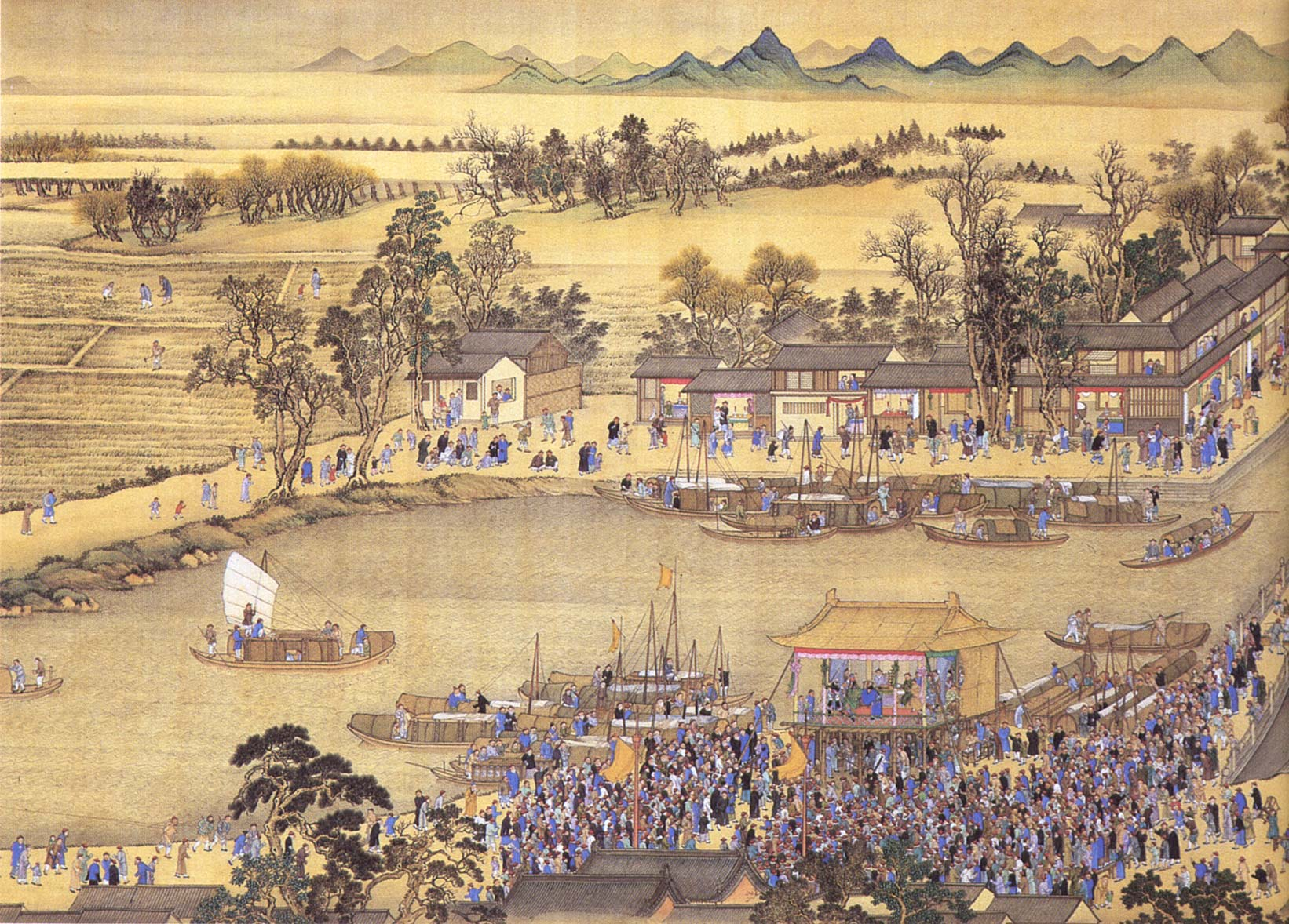 Wang Hui u. a.: Südreise des Kaisers Kangxi (Querrolle Nr. 9 - Ausschnitt: Theaterszene in Keqiao), ca. 1691–98, Tusche und Farbe auf Seide, Peking